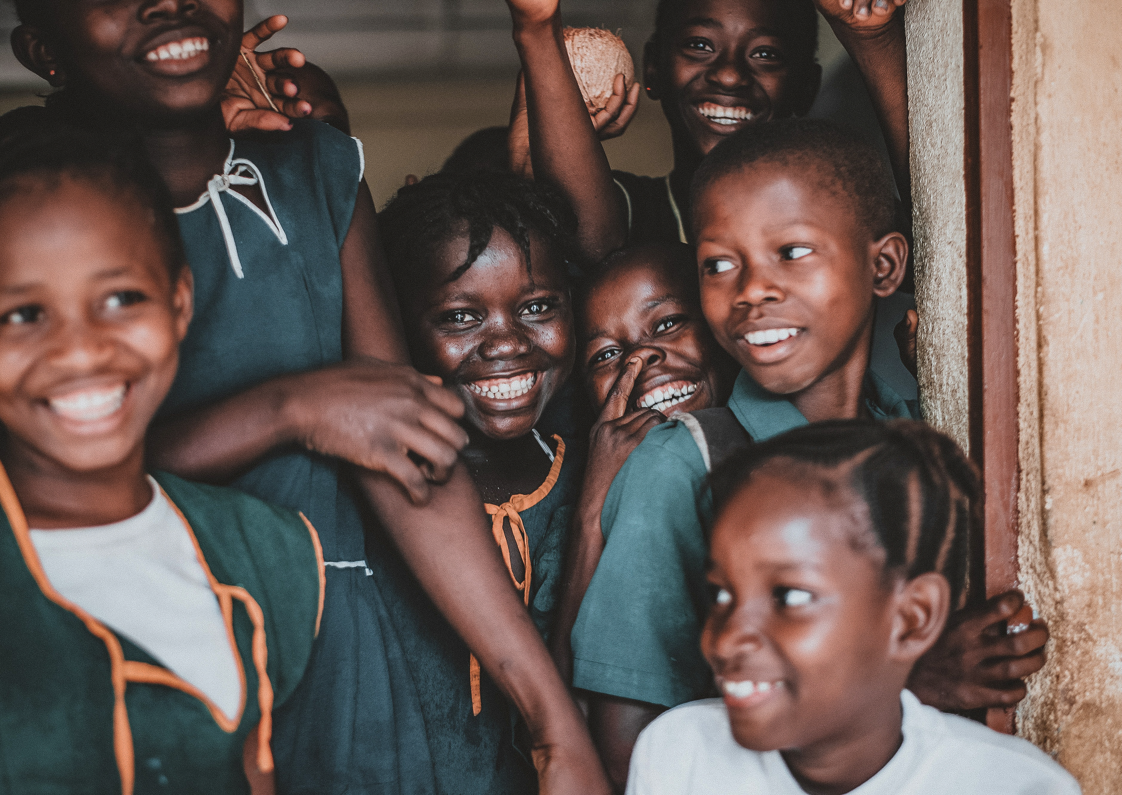 Igbo: Ụmụ akwụkwọ na-achị ọchị